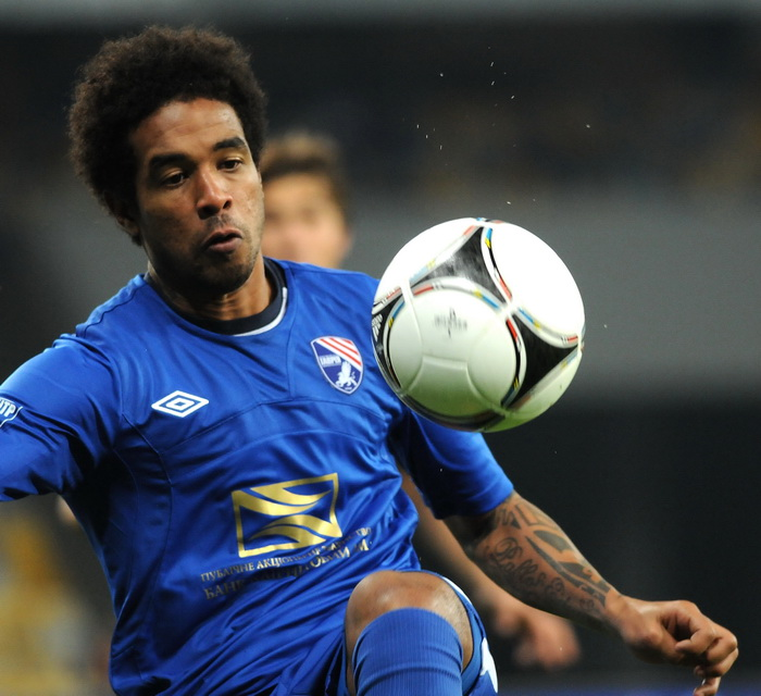 Eduardo da Silva Nascimento Neto